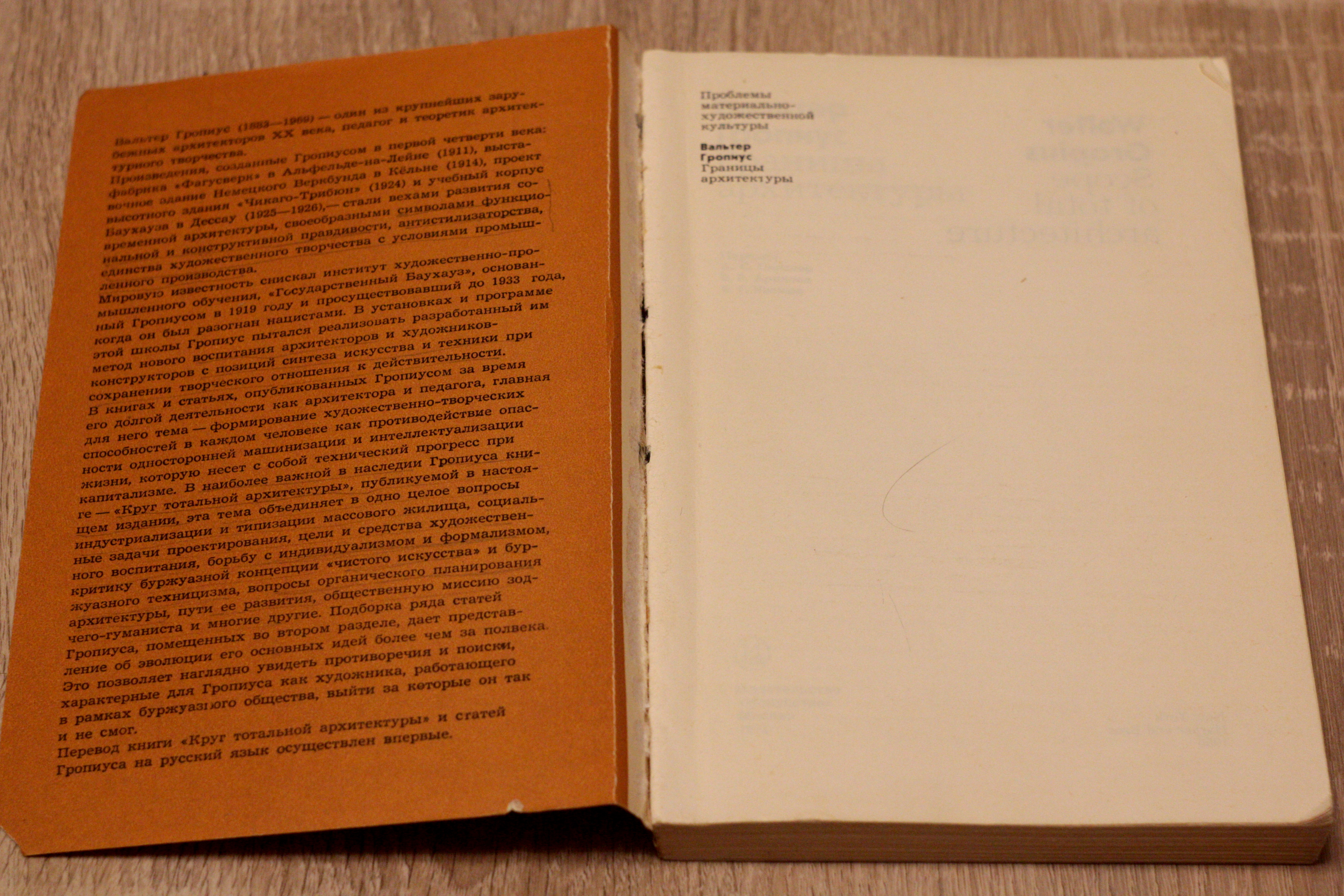 Книга, временно сброшюрованная, но не переплетённая, в бумажной обложке.